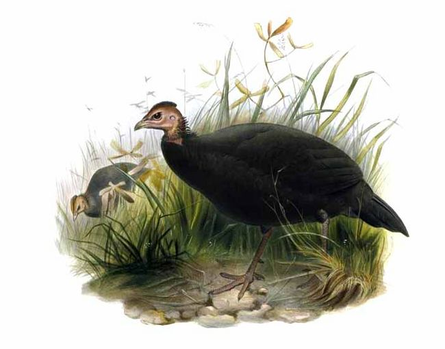 Agelastes niger